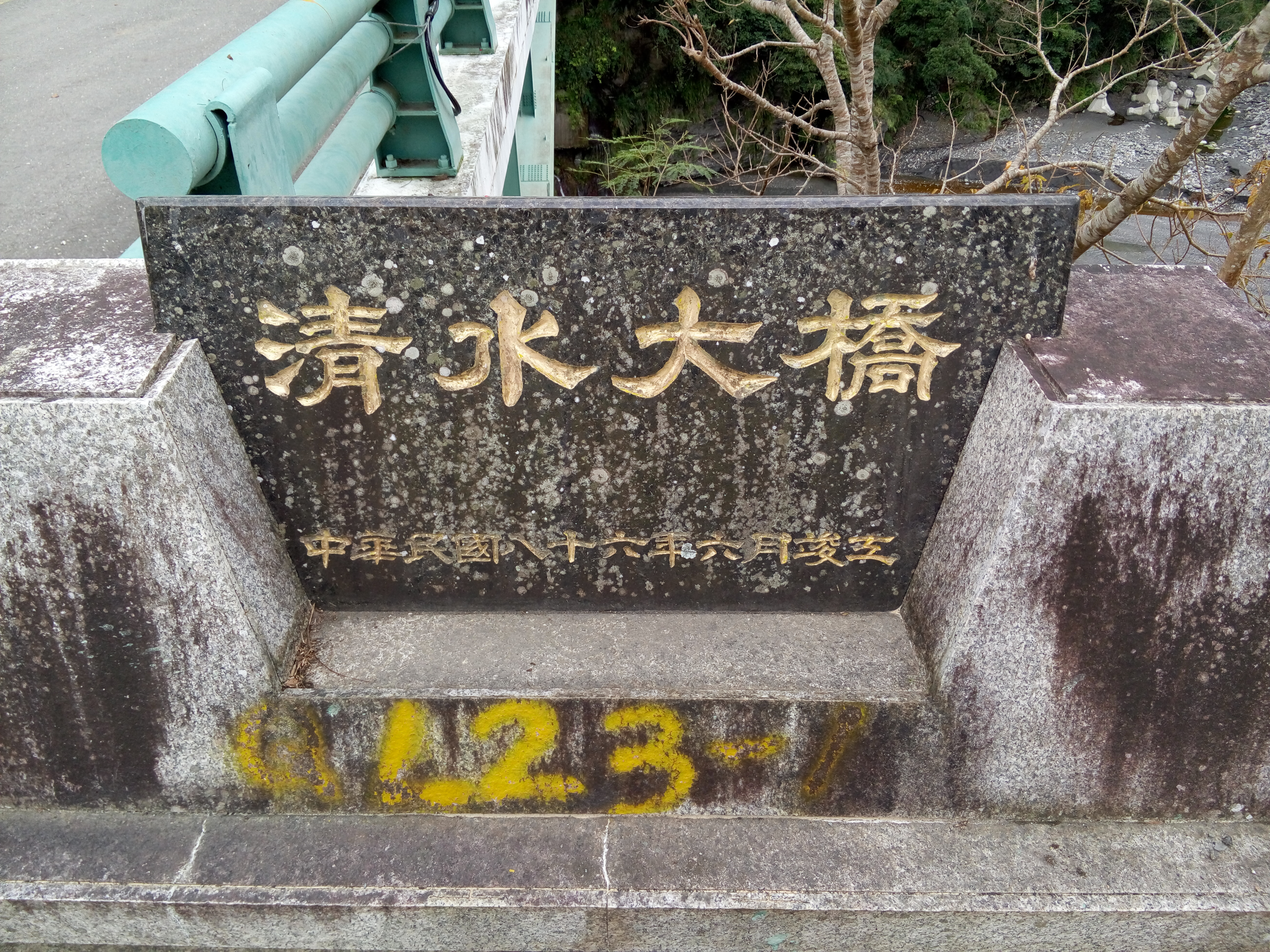 內本鹿古道東段 東36鄉道現況